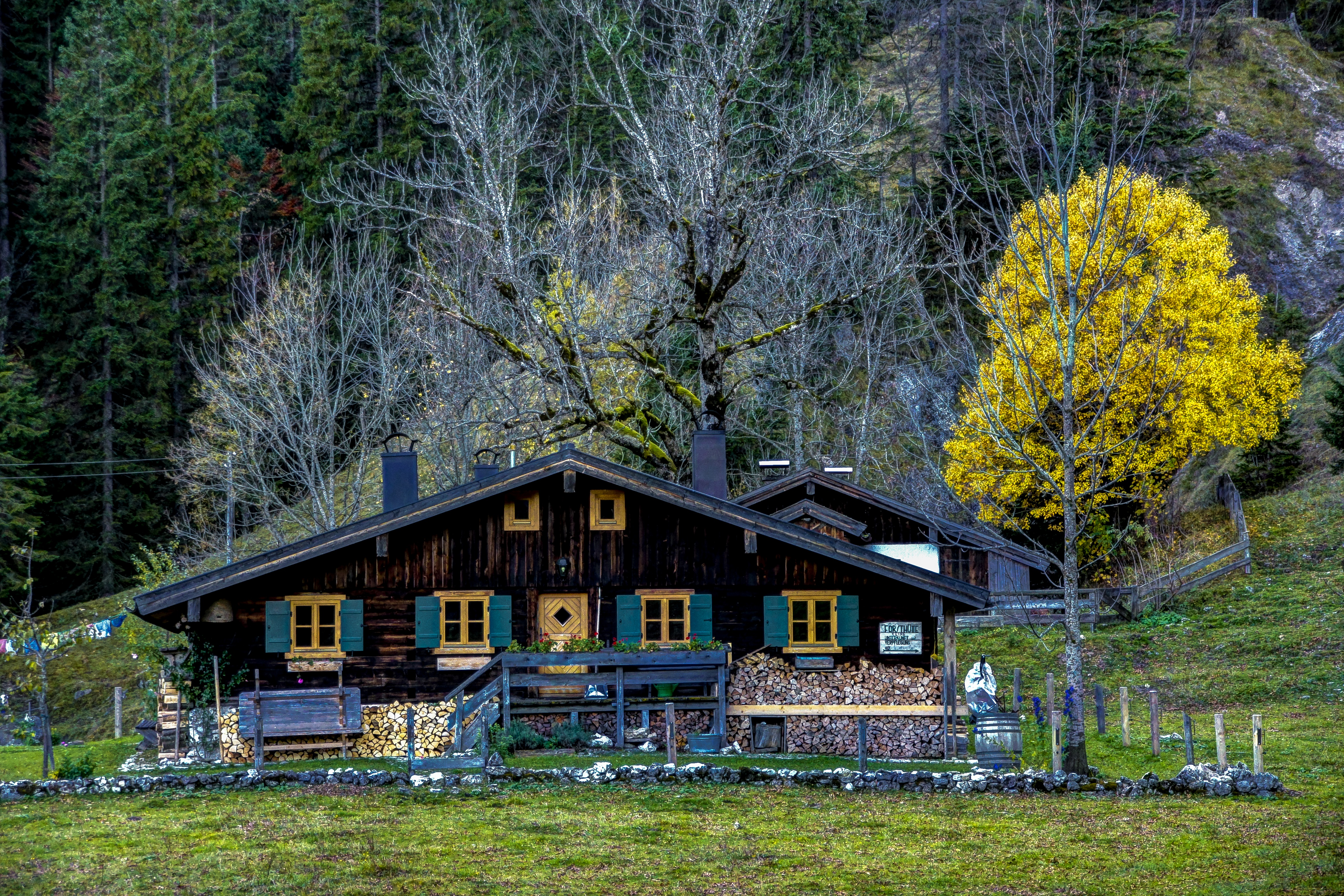 Die Mitteralm liegt auf 1165m auf halben Weg zwischen Branneburg und dem Gipfel des Wendelsteins im Mangfallgebirge